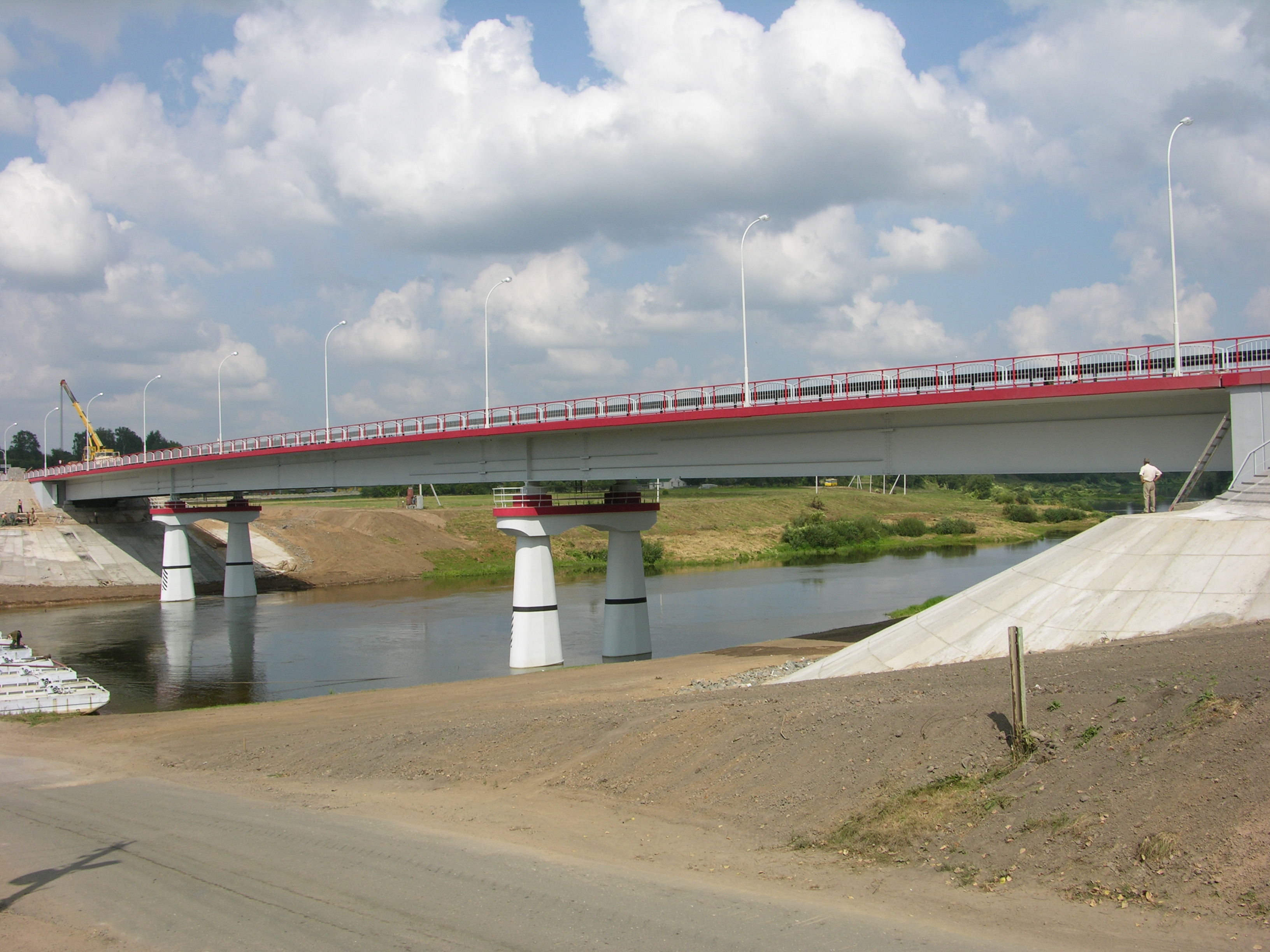 Автодорожный мост через Днепр в районе пгт Копысь Витебской области (Беларусь)